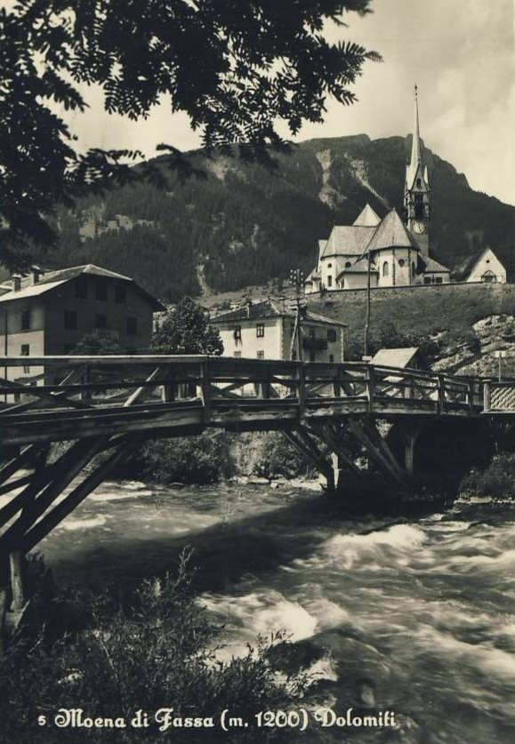 Moena di Fassa (m. 1200) Dolomiti